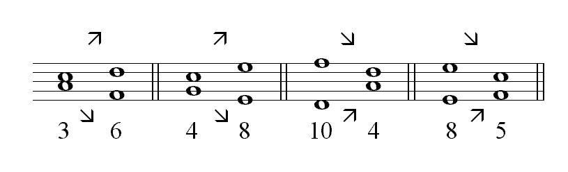 Description : Mouvement contraire Source : Personnelle Licence : GFDL